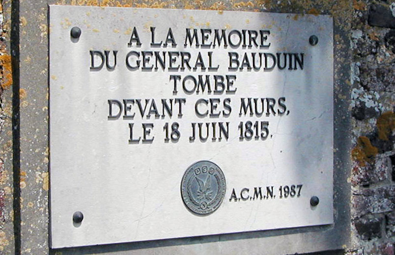 Photo de la plaque commémorative du général Bauduin à Hougoumont